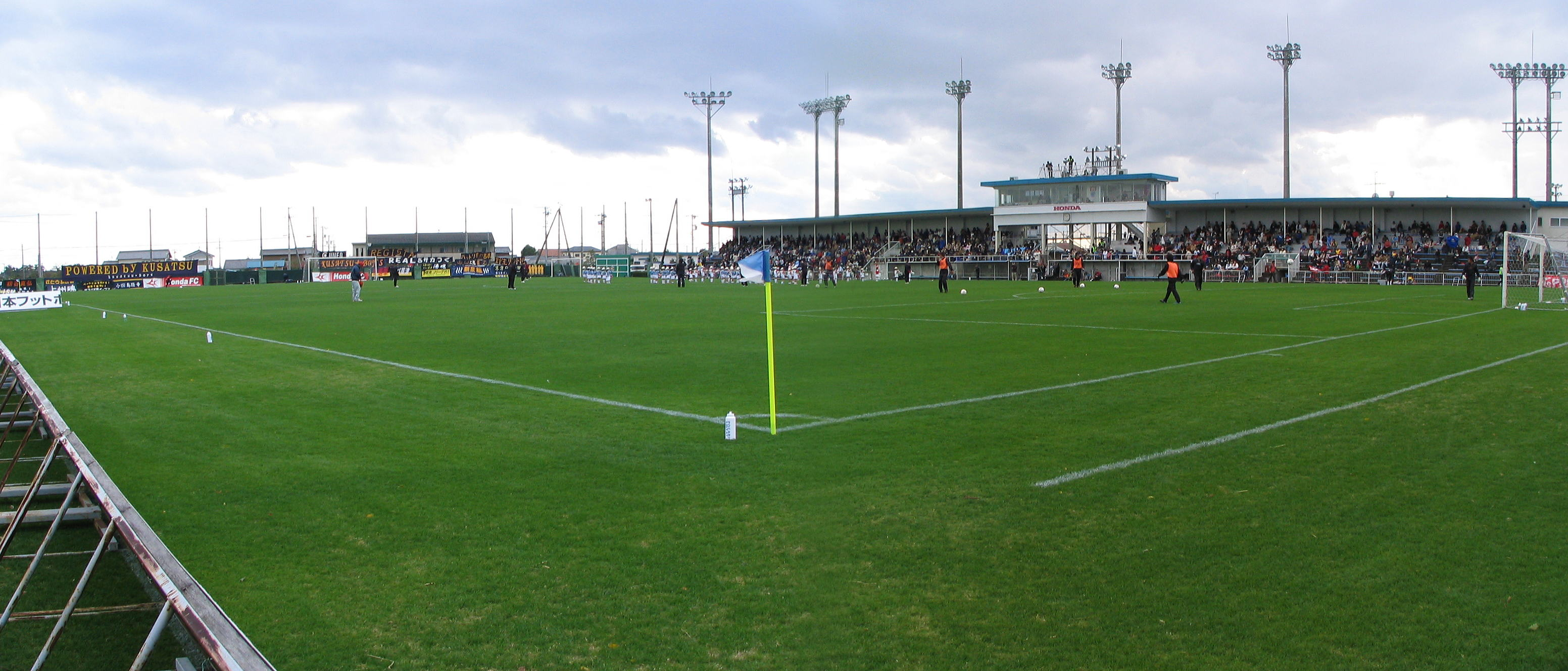 都田サッカー場におけるＪＦＬの試合